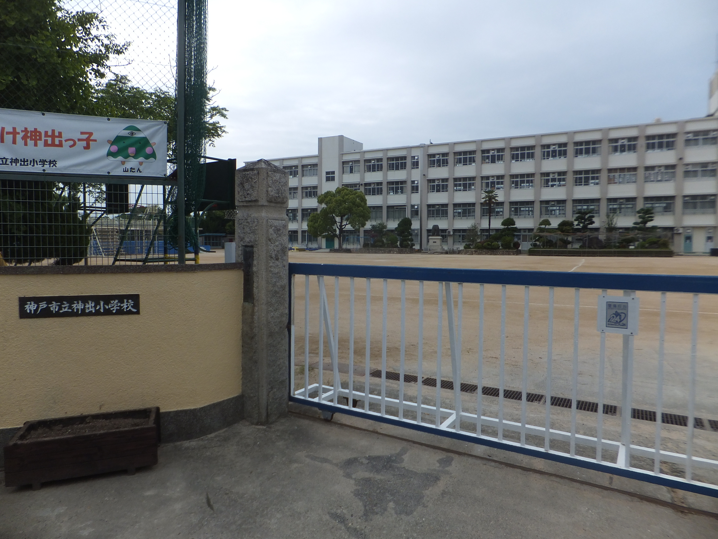 神戸市立神出小学校（2013年）